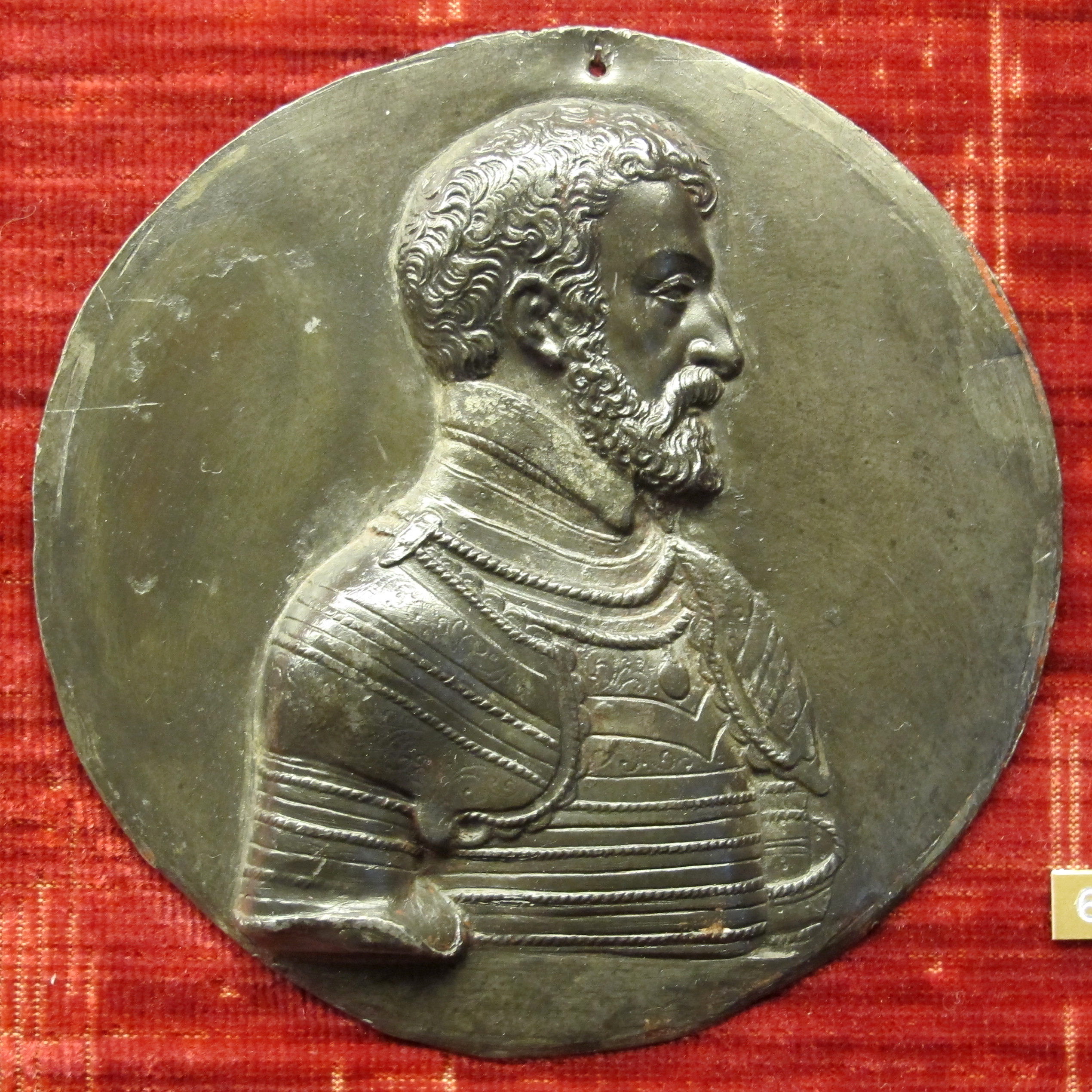 medaglia di autore anonimo